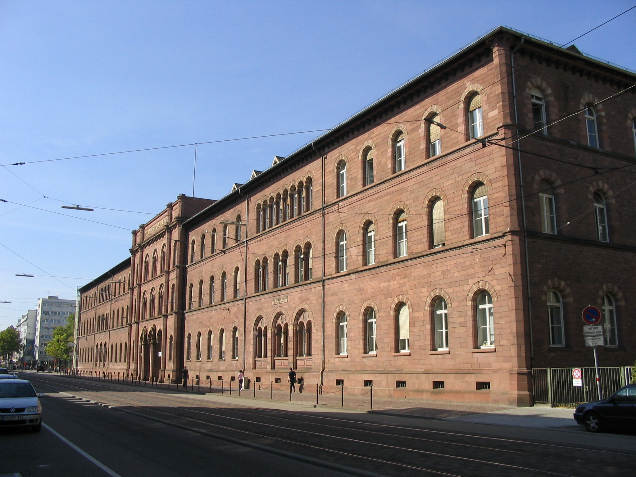 Altes Hauptgebäude der Karlsruher Universität